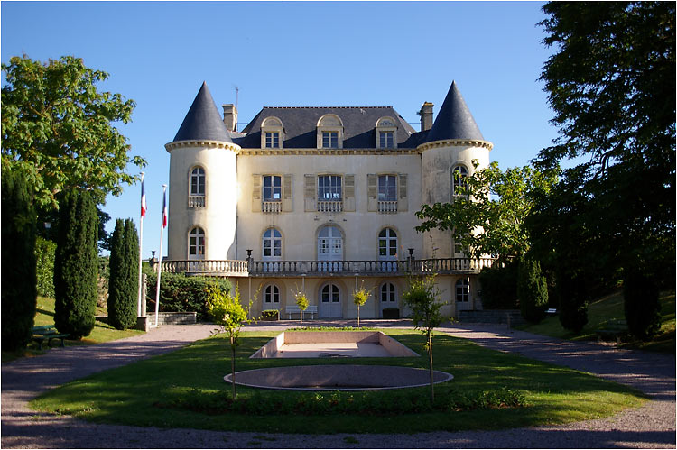 La villa Eugénie à Dinard ainsi nommée en l'honneur de l'épouse de Napoléon III . En effet elle devait venir passer des vacances à Dinard et cette villa avait été construite pour la recevoir. Finalement elle n'est pas venue.